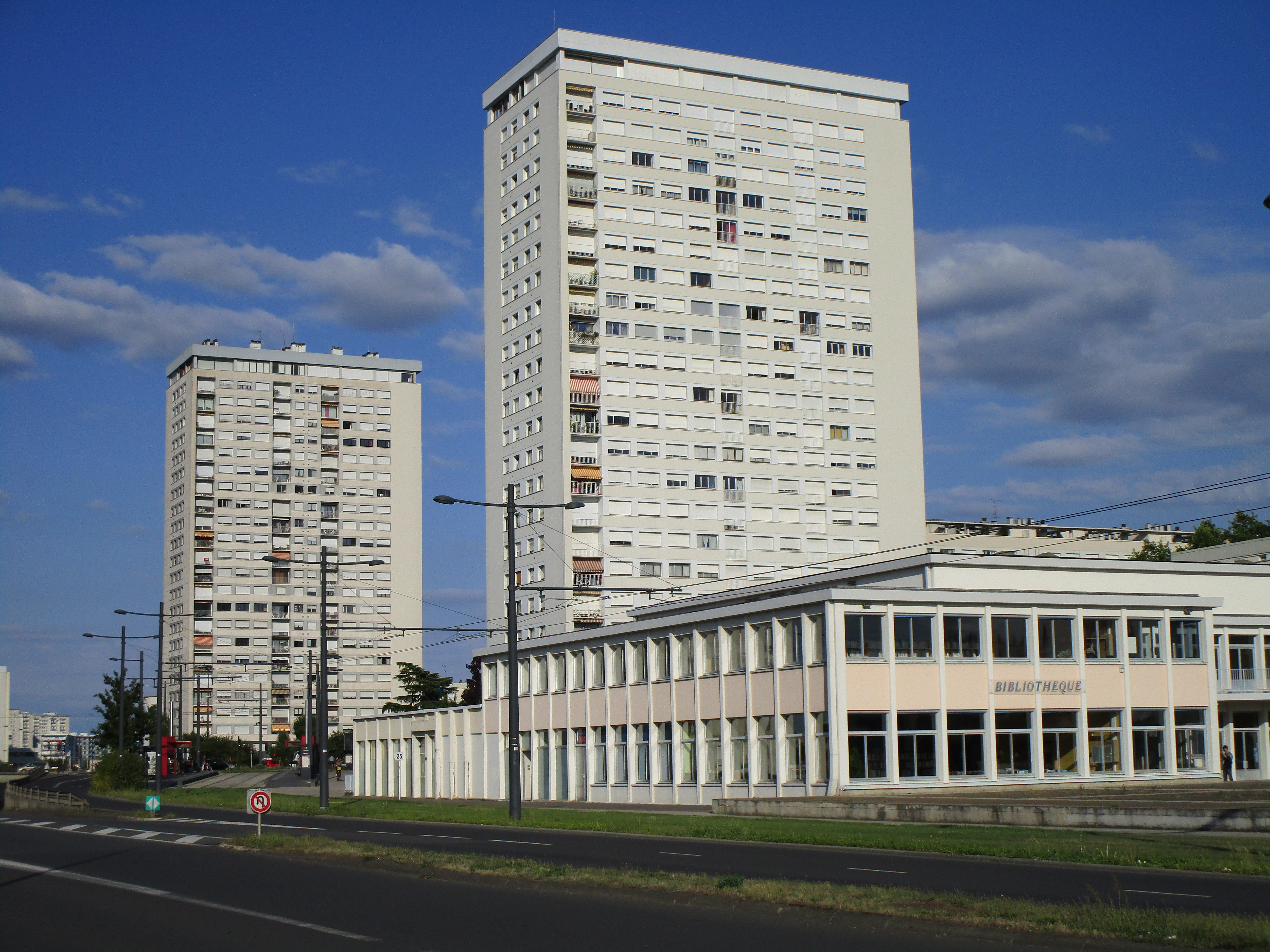 Les tours jumelles de Verdun (façade ouest), sur le carrefour Verdun, à Tours, vues depuis le boulevard Winston Churchill.